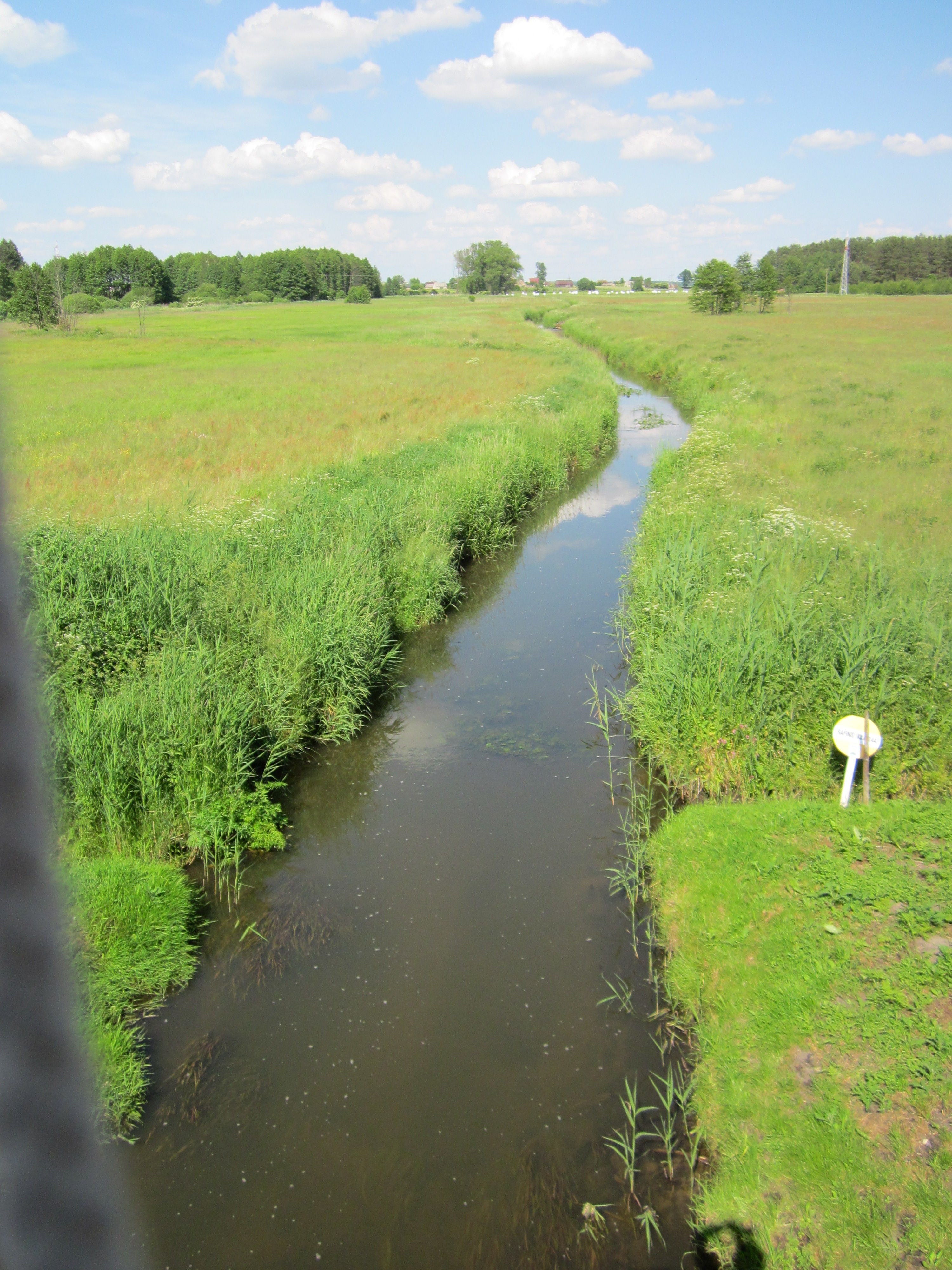 Nereśl w m. Czechowizna